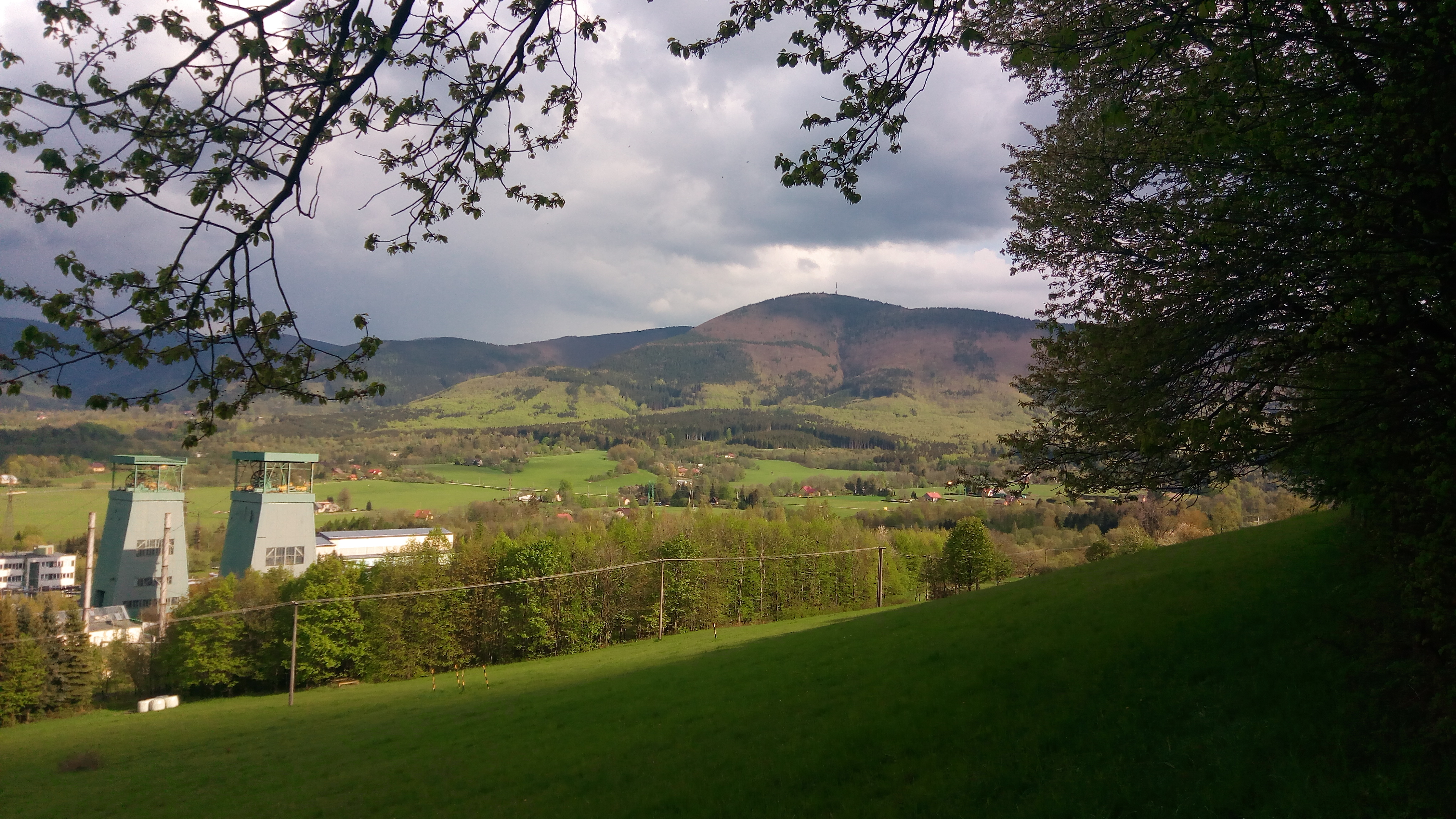 Důl Frenštát